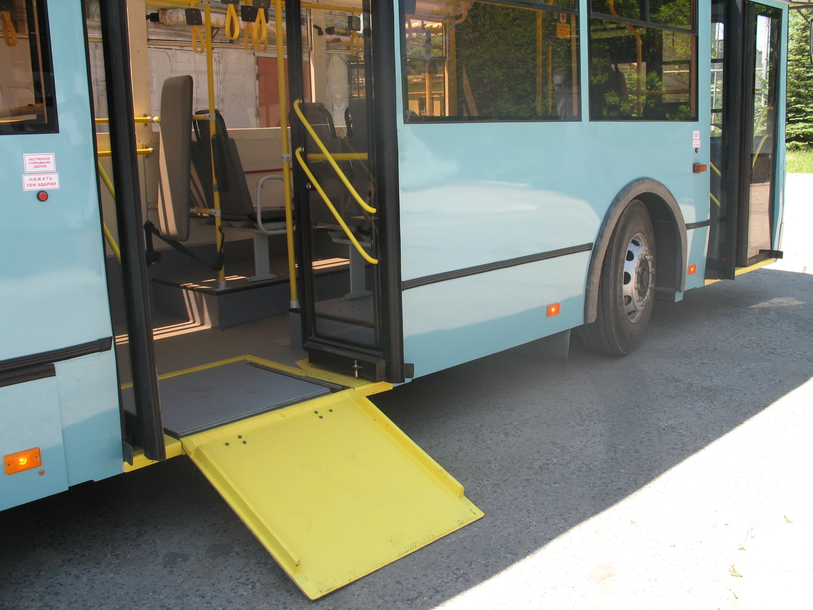 троллейбус снят на территории предприятия